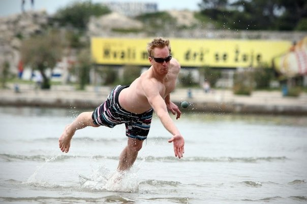 Picgin